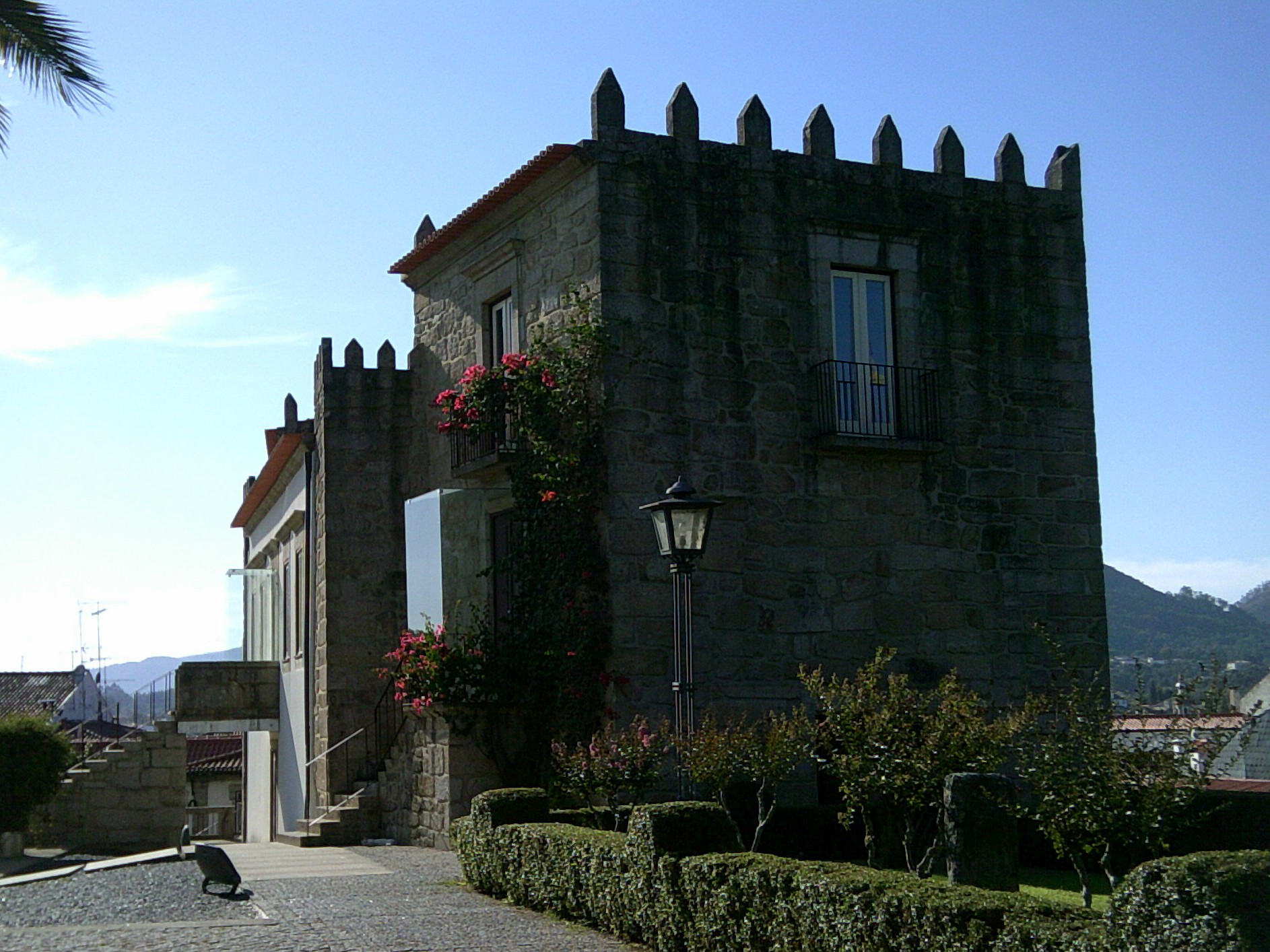 Paços do Marquês, freguesia, cidade e concelho de Ponte de Lima, concelho de Viana do Castelo, Portugal.